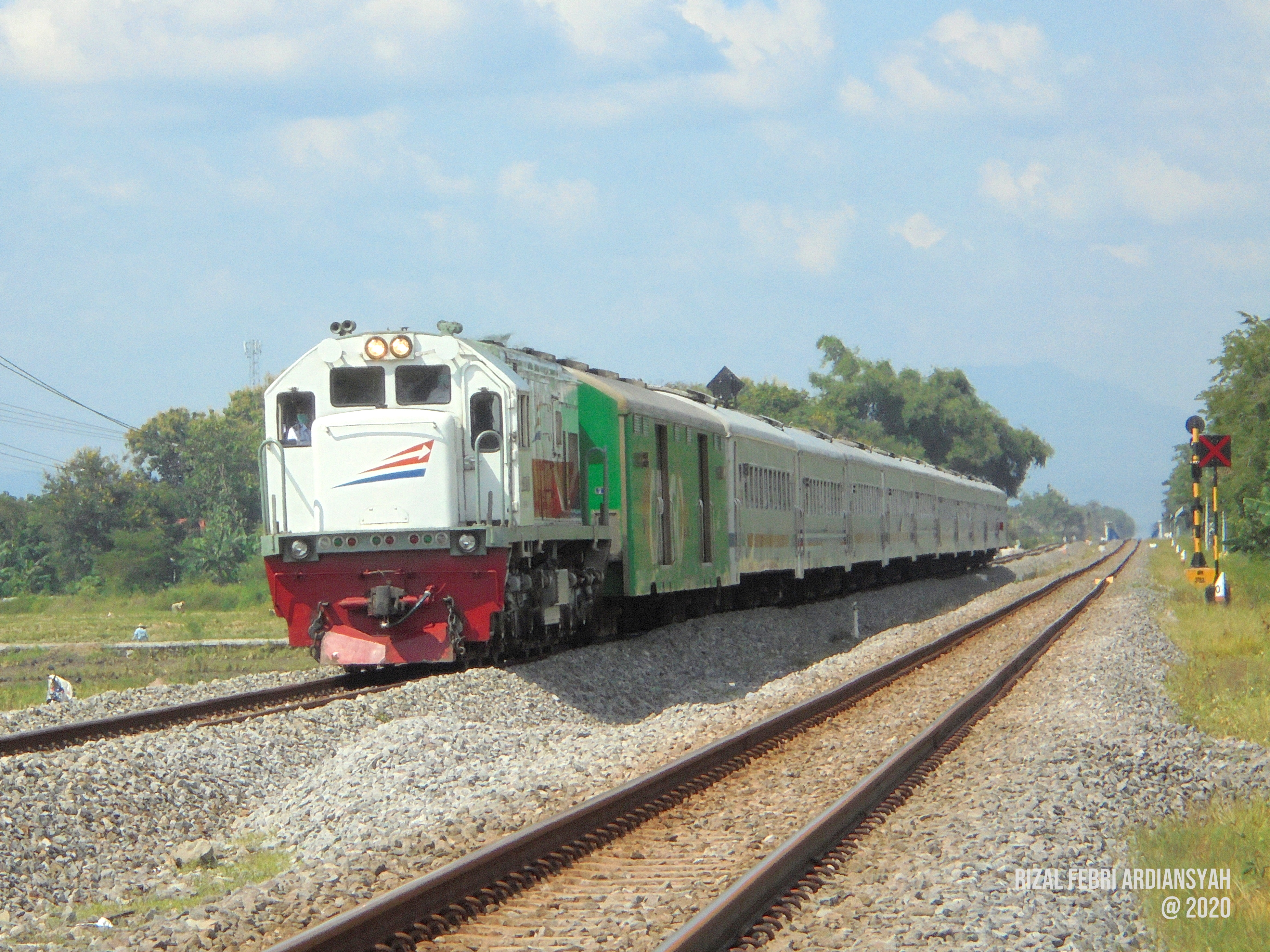 Kereta api Matarmaja saat melintas di Rejomulyo, Kartoharjo, Madiun